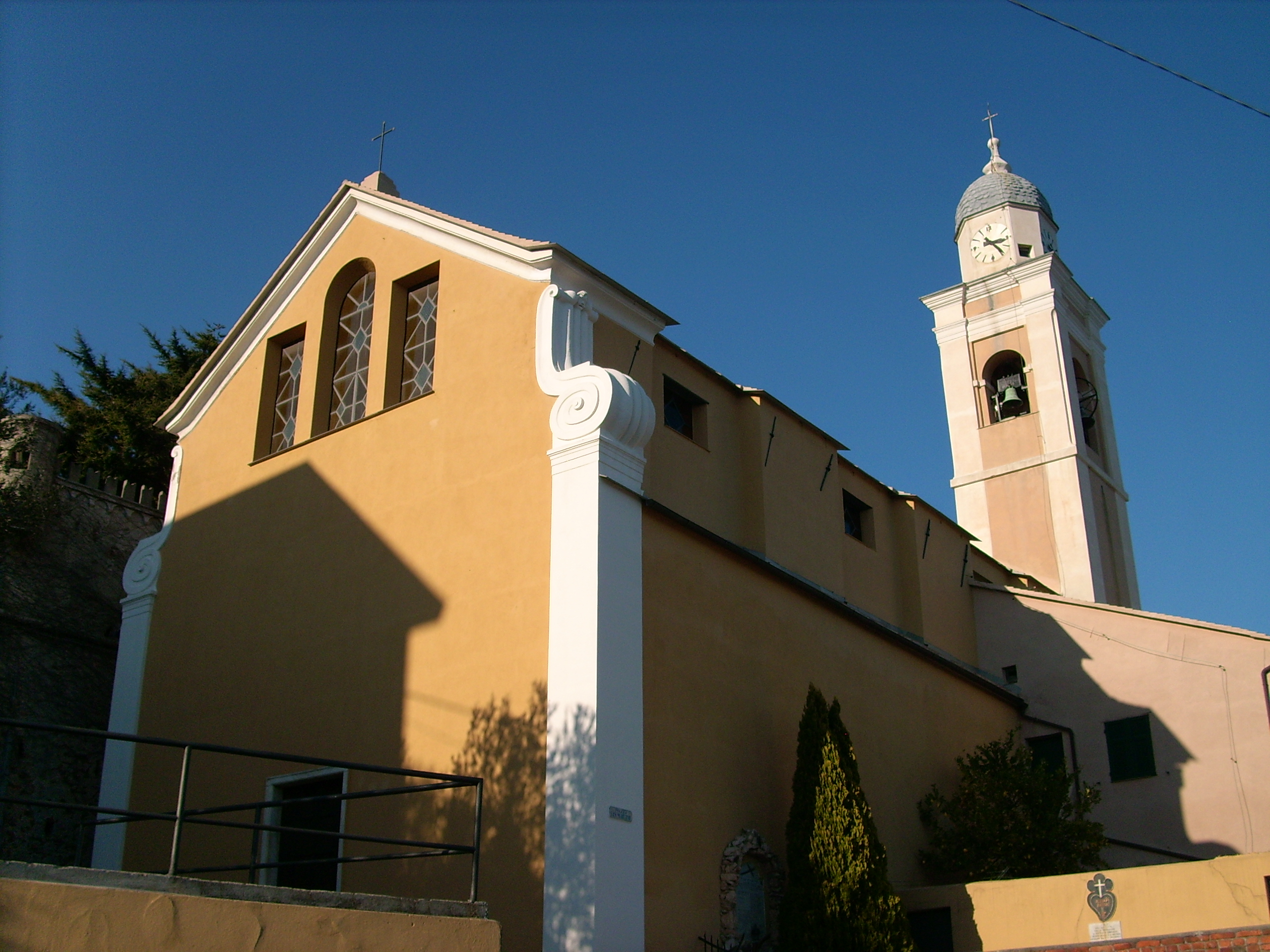 Chiesa di San Martino a Bergeggi, Liguria, Italy